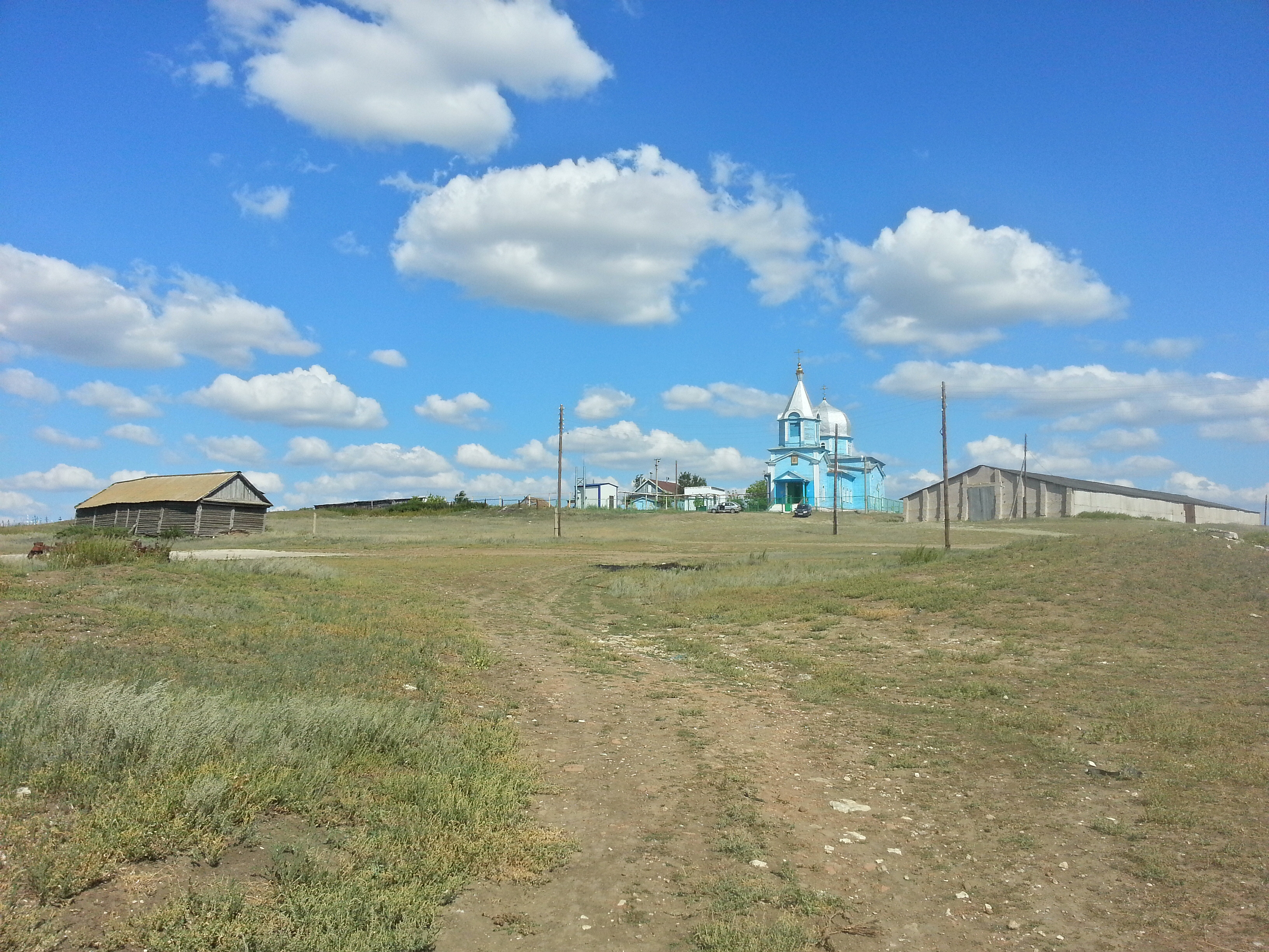 Orekhovka, Samarskaya oblast', Russia, 446651